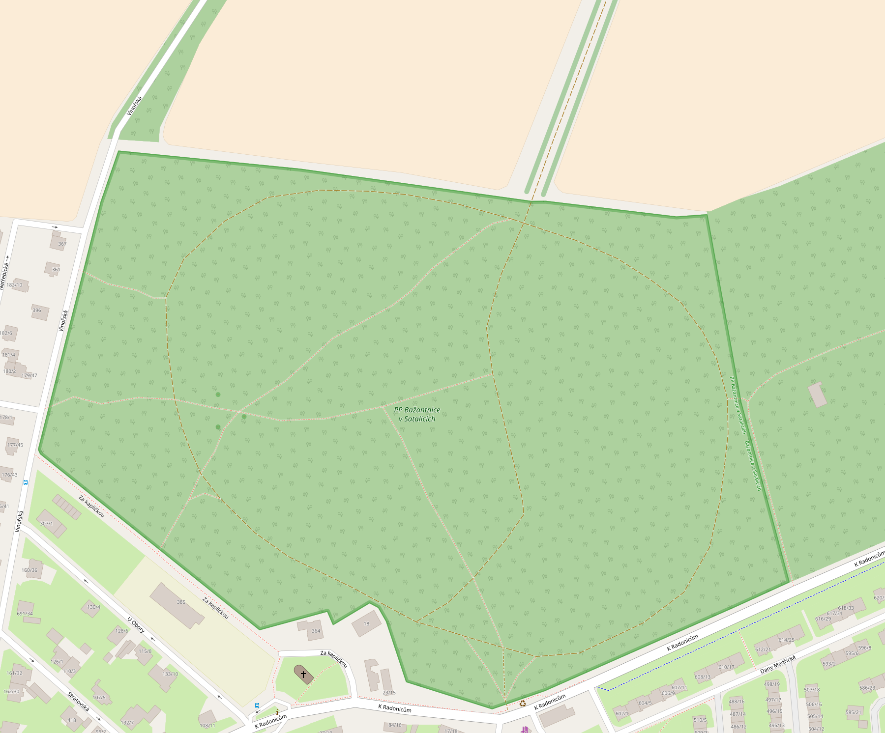 Mapa vytvořena přispěvateli OpenStreetMap. Na ní jsou označeny hranice a okolí PP Bažantnice v Satalicích.